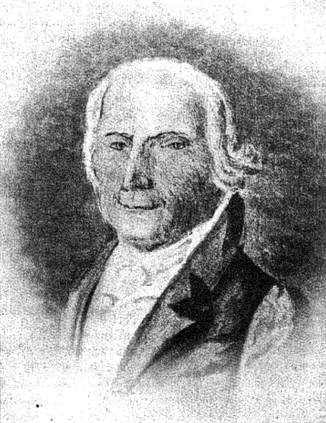 Pierre-Louis Guinand (1748–1824), wohl Reproduktion eines Aquarells seines Schwiegersohns Georges Louis Christophe Couleru (1781–1865). Guinand war Glasschmelzer und Optiker in Les Brenets (Kanton Neuenburg), Pionier der Herstellung optischen Glases, Lehrer Joseph von Fraunhofers in Benediktbeuern. Aus Paul lassardot: Les premiers verres d´optique. In: La Nature (Paris), 24. Dezember 1921, S. 407–412, hier: S. 411. Wohl Vorlage zur Lithografie von Étienne-Ovide Domon (1807–1873), Neuenburg 1844.